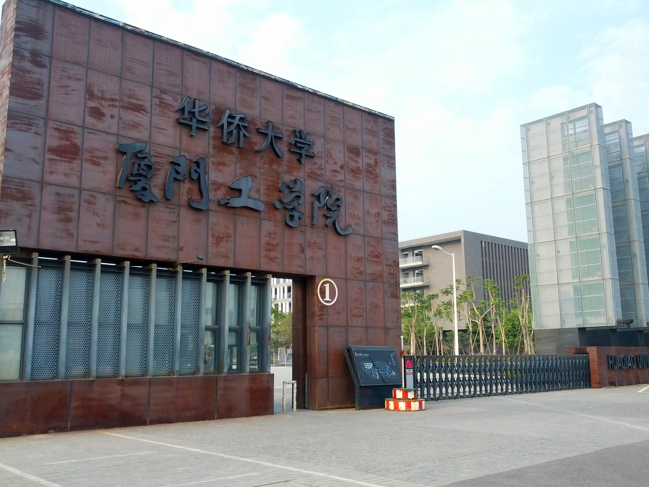 中文（中国大陆）: 华侨大学厦门工学院大门